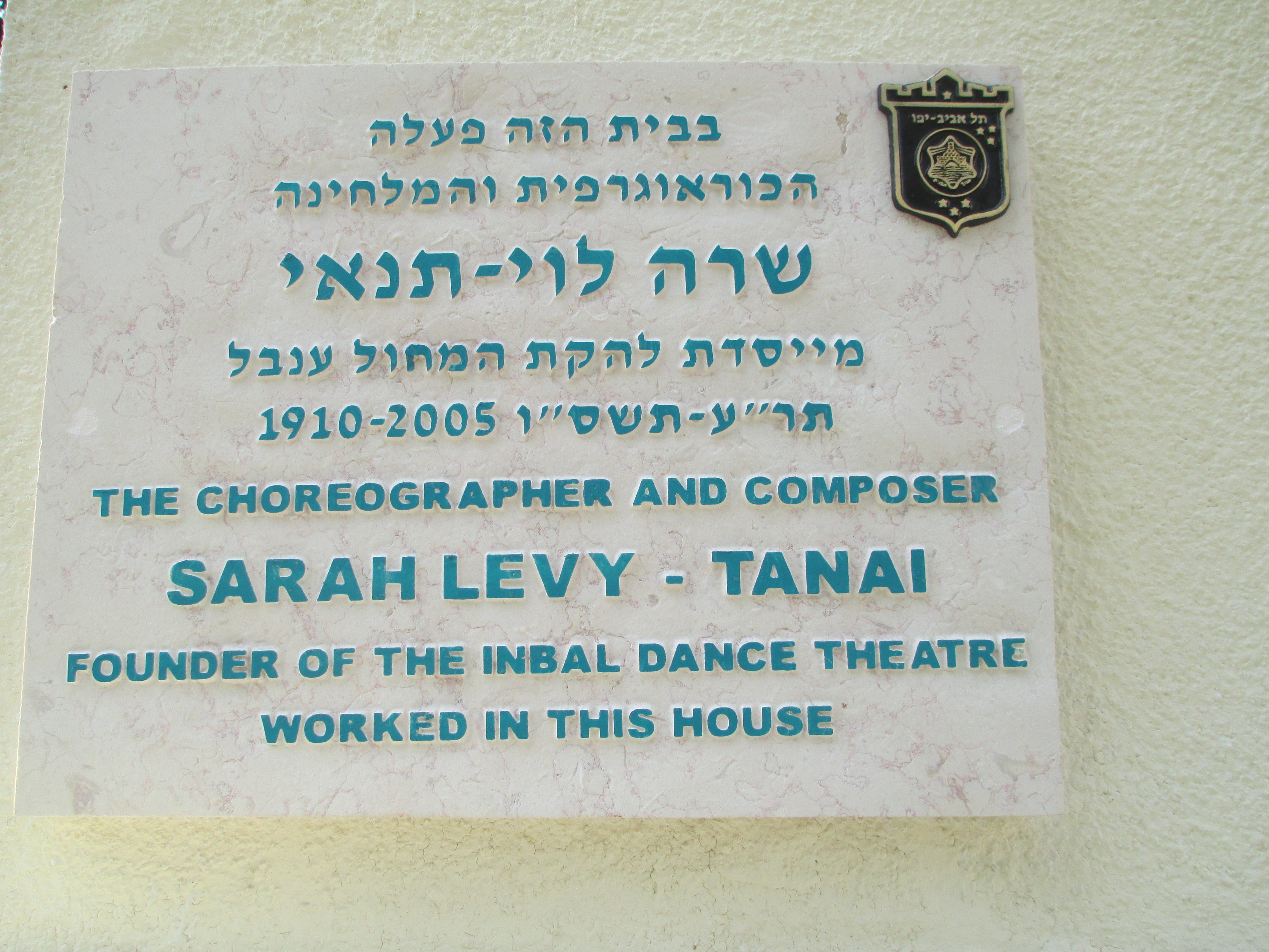 לוחית זיכרון לשרה לוי-תנאי בכניסה לתיאטרון ענבל ברחוב אמזלג 15 בתל אביב